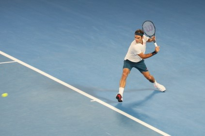 2019 Australian Open